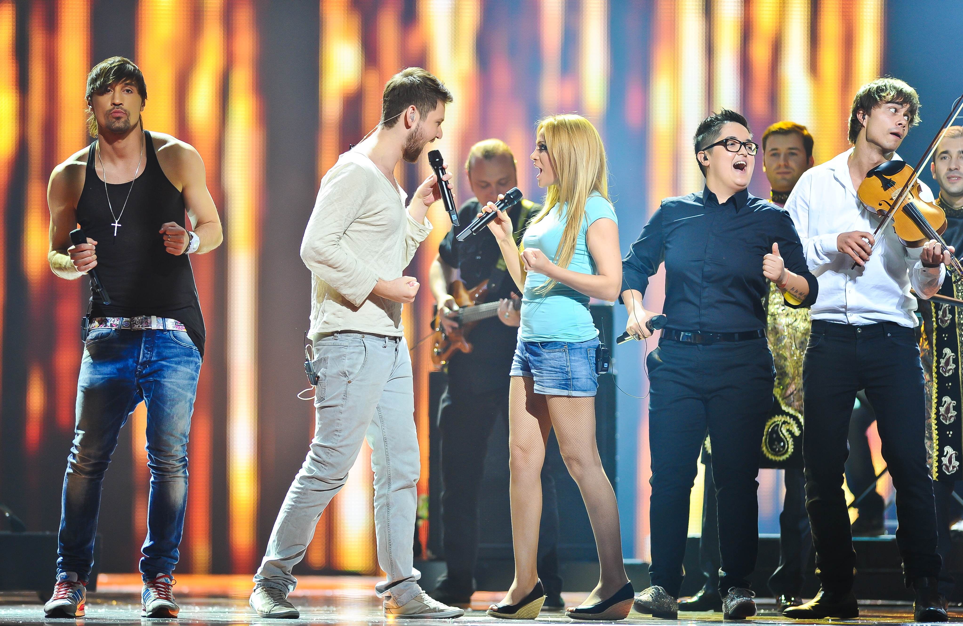 Звезды Евровидения